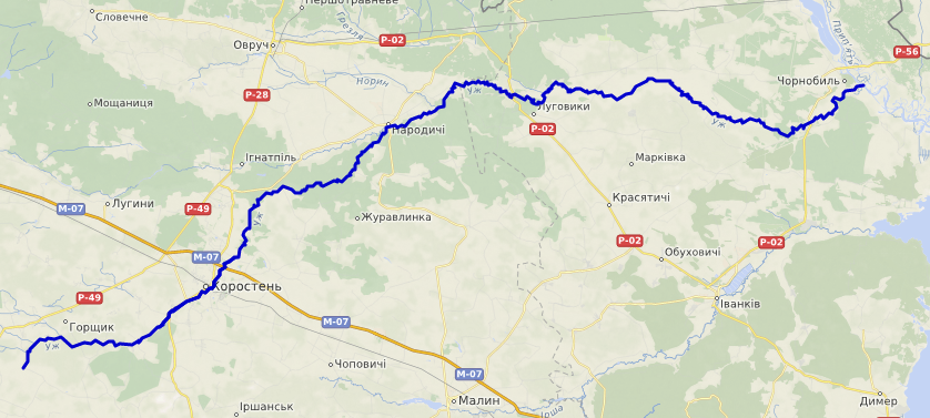 carte réalisée sur umap This map may be incomplete, and may contain errors. Don't rely solely on it for navigation.